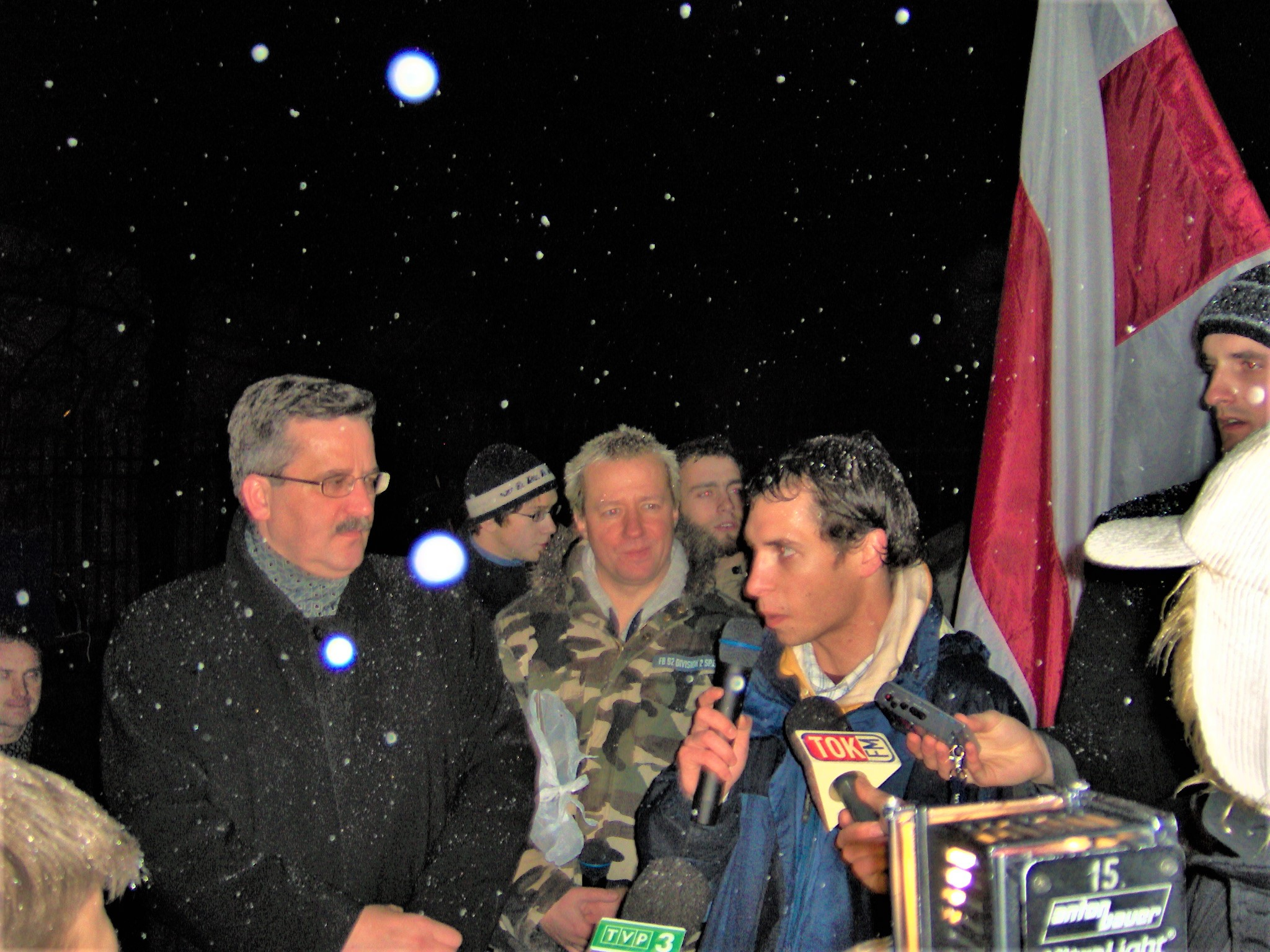 Dzień Solidarności z Białorusią - Warszawa, grudzień 2005